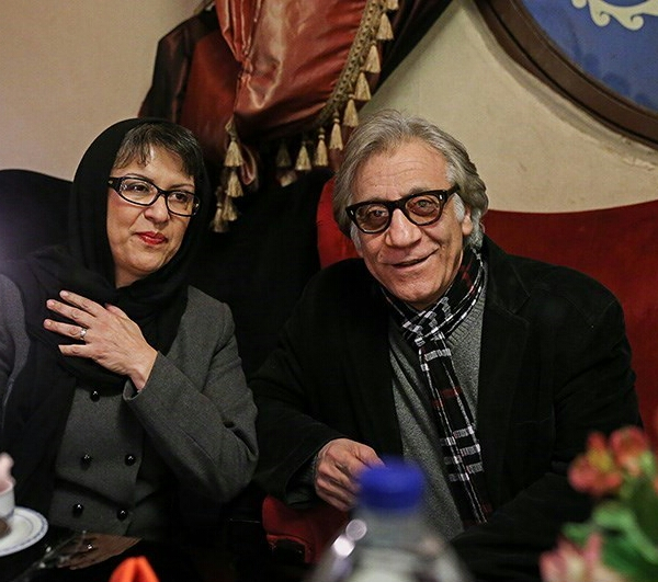 مسعود رایگان و رویا تیموریان، دی ۱۳۹۳